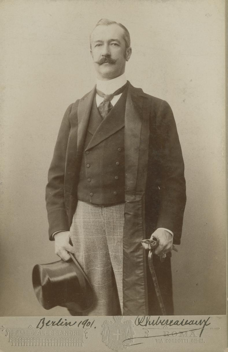 Ramón Subercaseaux Vicuña (Valparaíso, 10 de abril de 1854 — Viña del Mar, 19 de enero de 1937)1 2 fue un político, diplomático y pintor chileno.